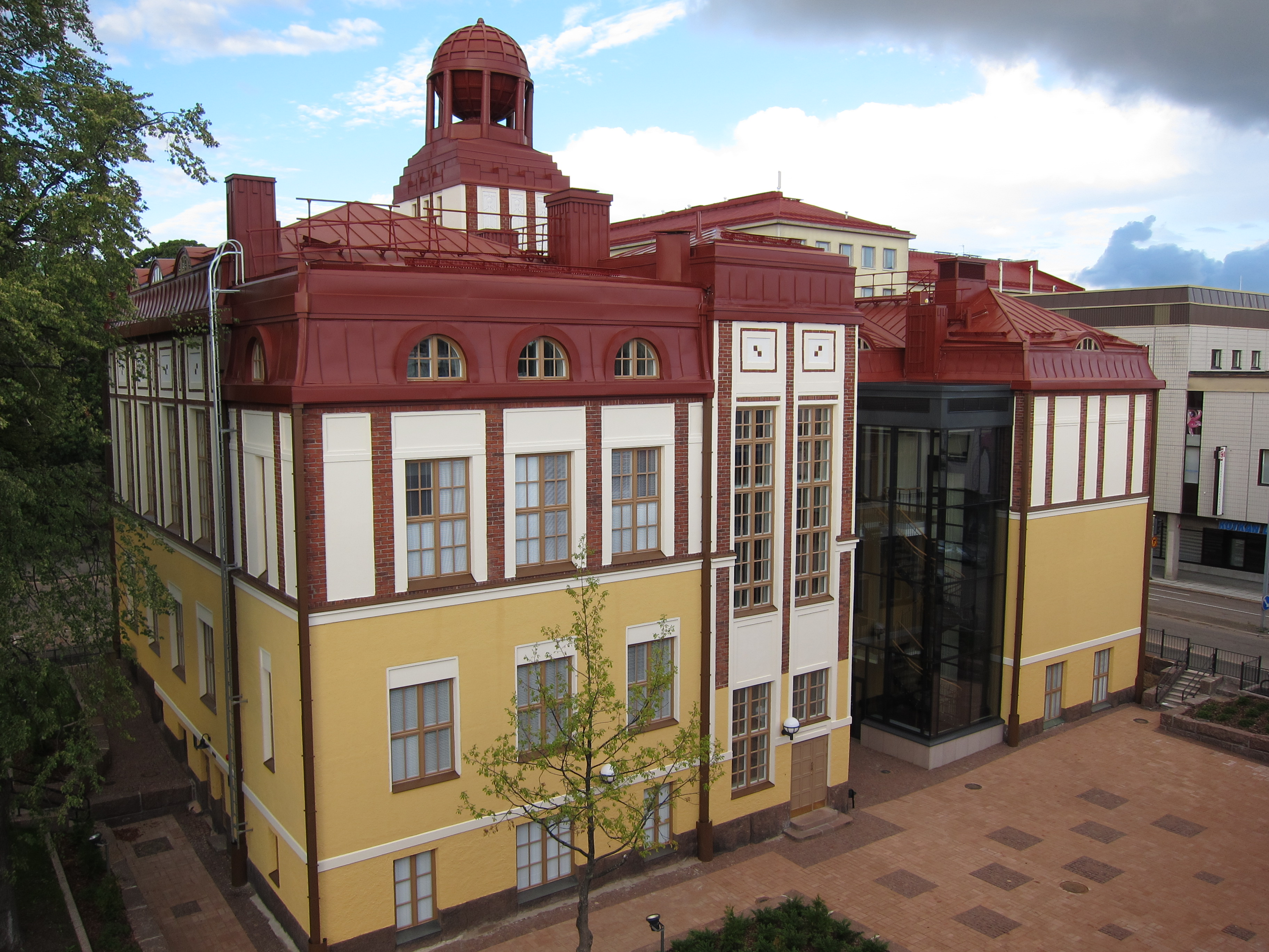 Entinen Kotkan kauppaoppilaitoksen rakennus, joka on toiminut myös Kymenlaakson maakuntamuseona.